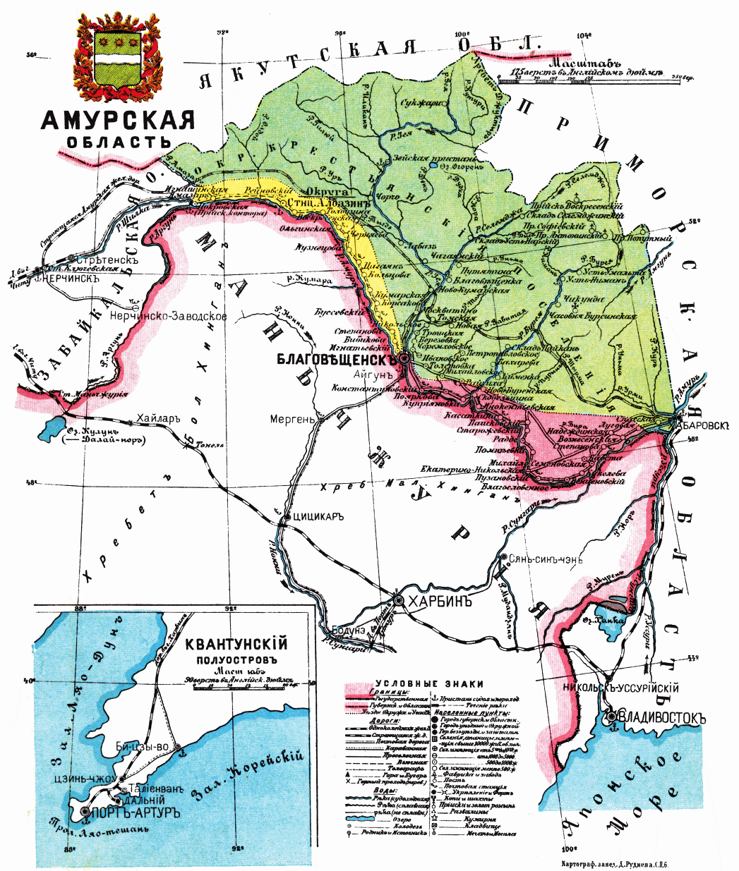 Карта Амурской области, 1913